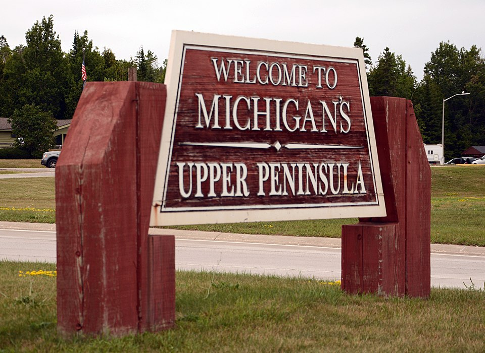 Upper Peninsula welcome plate